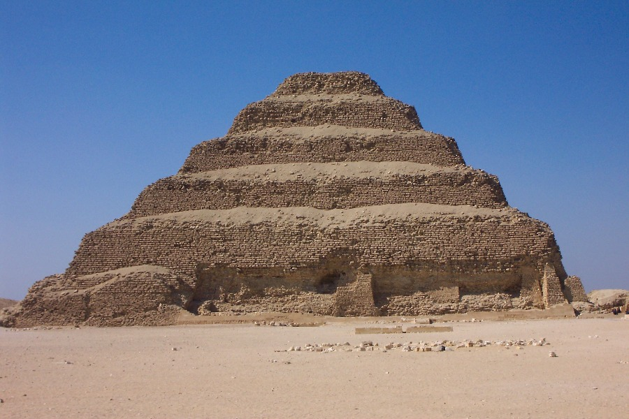 Vista frontal de la pirámide de saqqara, considerada como la primera piramide de Egipto.